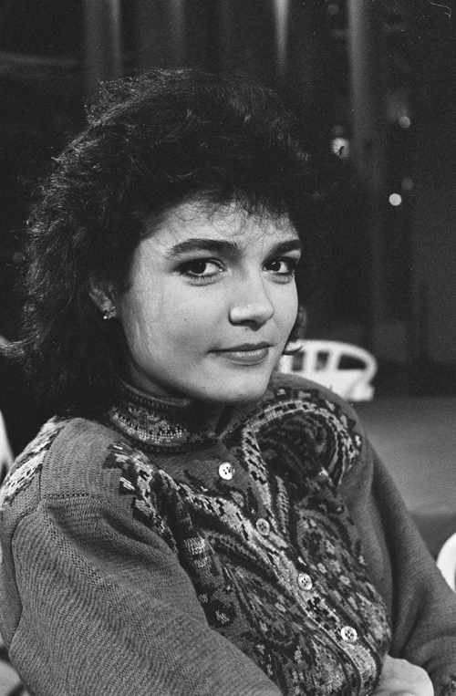 Goedele Liekens, 1987, VARA, Archief Beeld en Geluid, VARA-schenking, catalogusnummer FTA001130701, fotonummer 6 (oud archiefnummer VA0277).